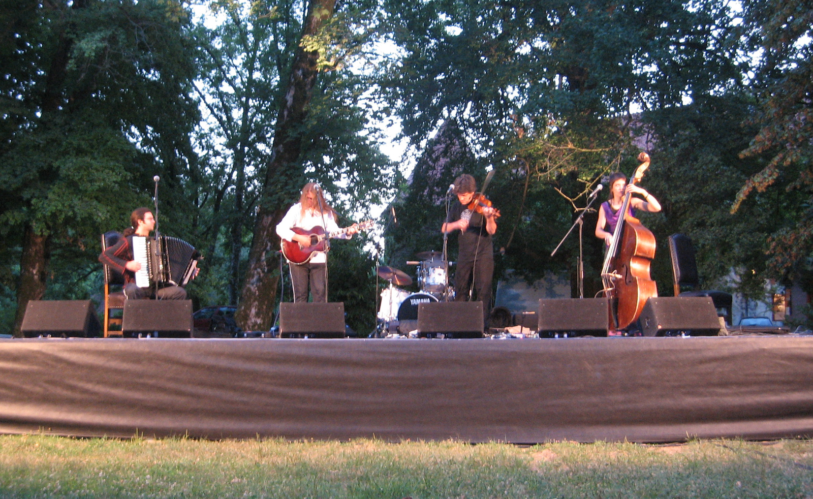 Terrafolk, slovenska glasbena skupina. Koncert na Otočcu 2007. Z leve na desno: M. Hatlak, D. Černe, B. Cvetrežnik, K. Hosking